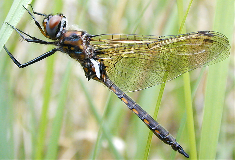 teneral male Spiny Baskettail (Epitheca spinigera)